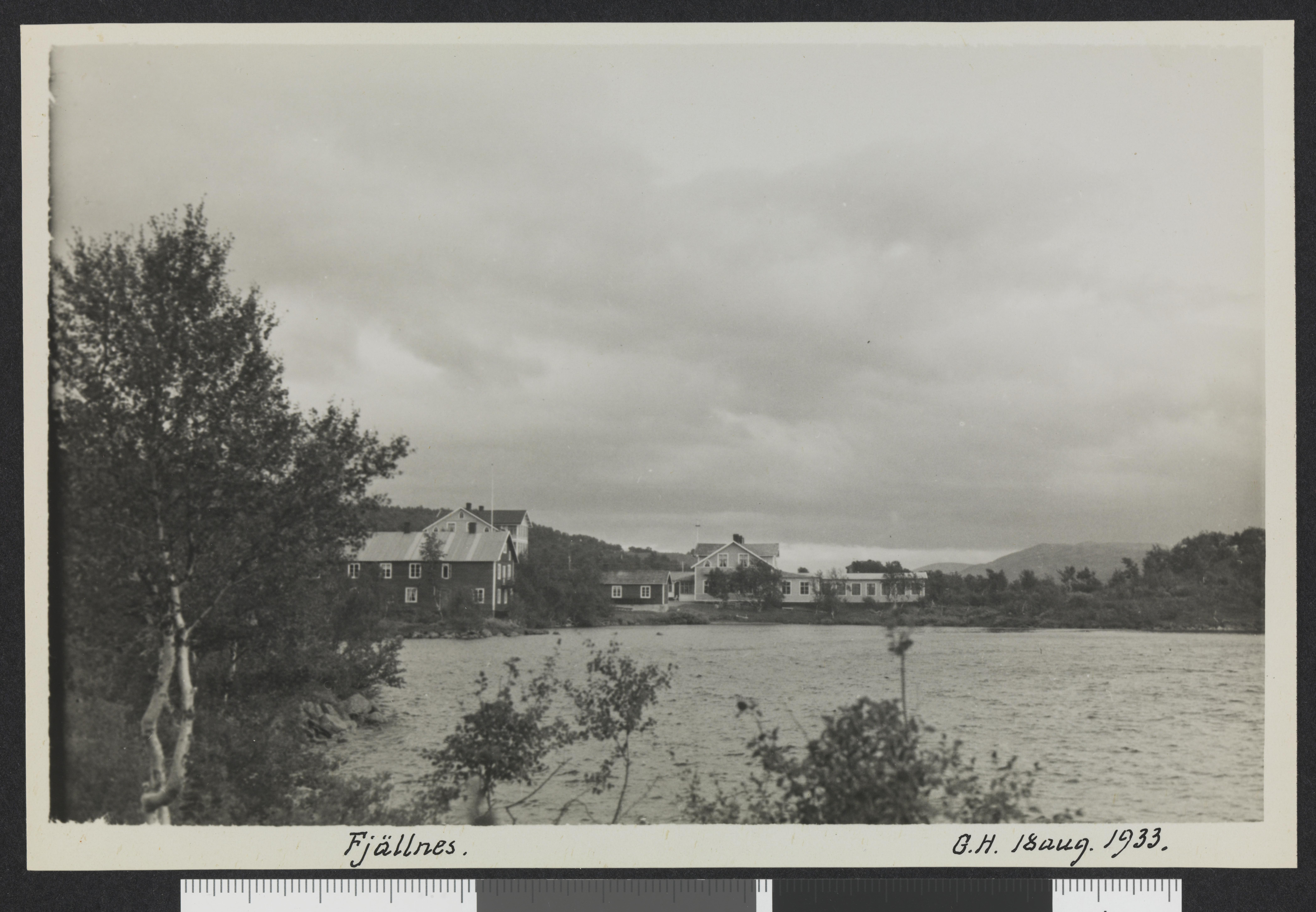 Bildet er hentet fra Nasjonalbibliotekets bildesamling. Anmerkninger til bildet var: Lå i hvit konvolutt merket: "1933. Tur til Fjällnes". Se også GH01_00161 som er fra samme sted, samme dag. Fjellnäs,Malmagen, Härjedalen, Jämtland